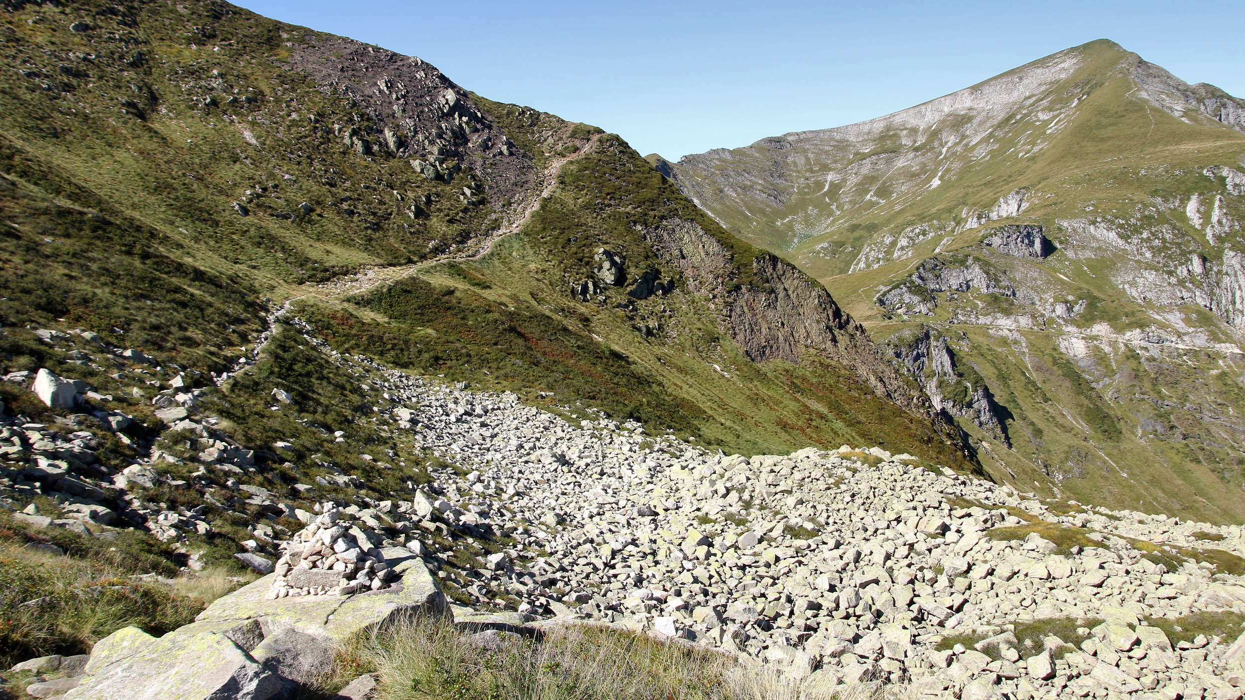 Sentier GR10 vers le Port de Saleix et le Mont Ceint (Pic de Girantès) en fond. Vue prise depuis le sud-est.